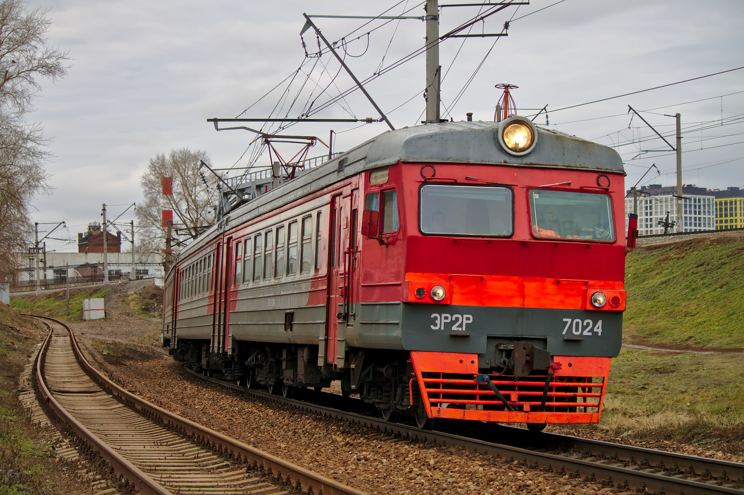 ЭР2Р-7024, станция Москва-Рижская. см. фото 638222 в альбоме автора